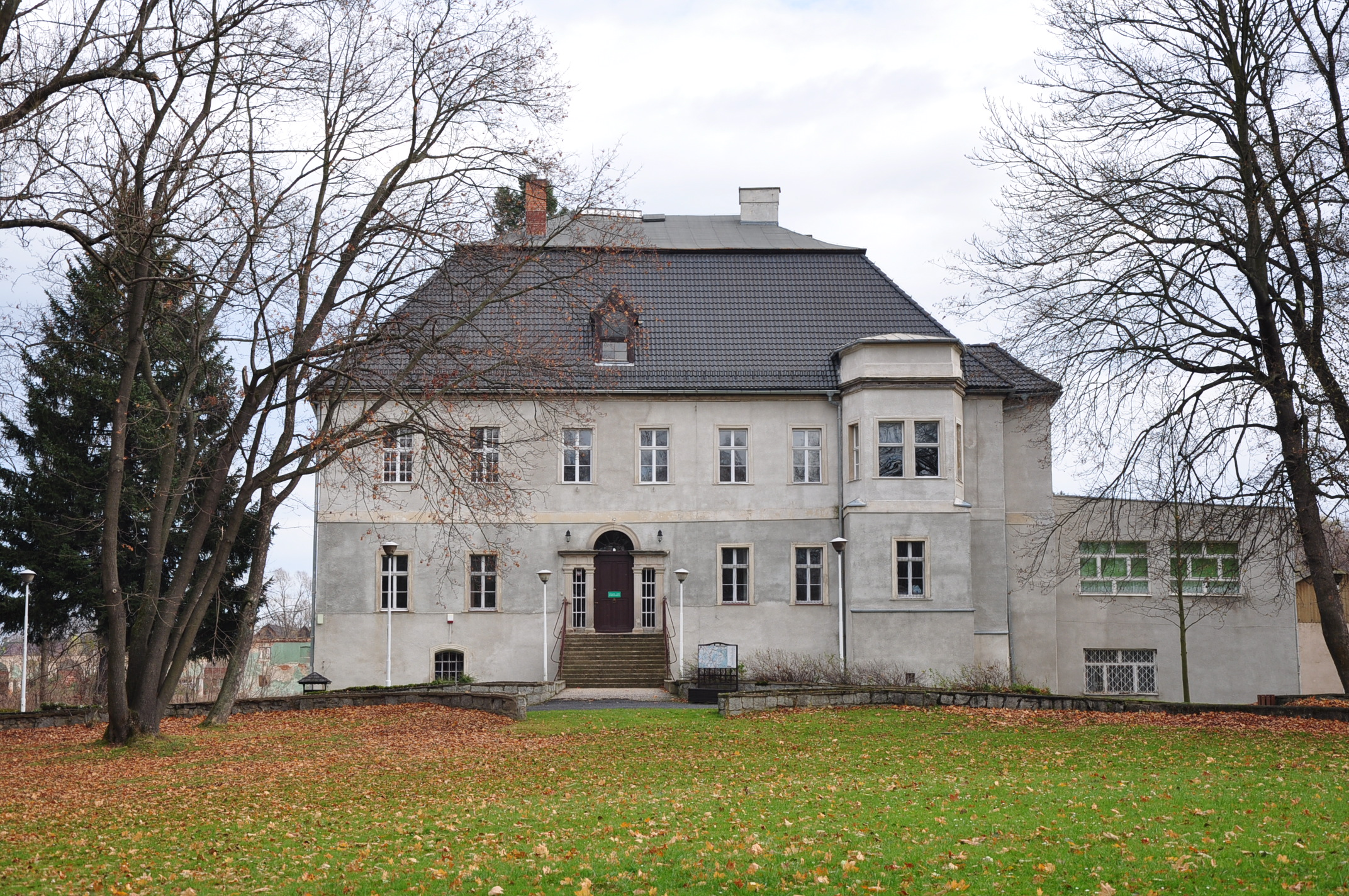 Bukowiec, pałac, 2 poł. XVI, XVIII